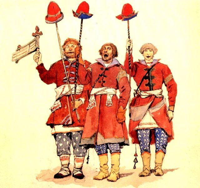 Бирючи